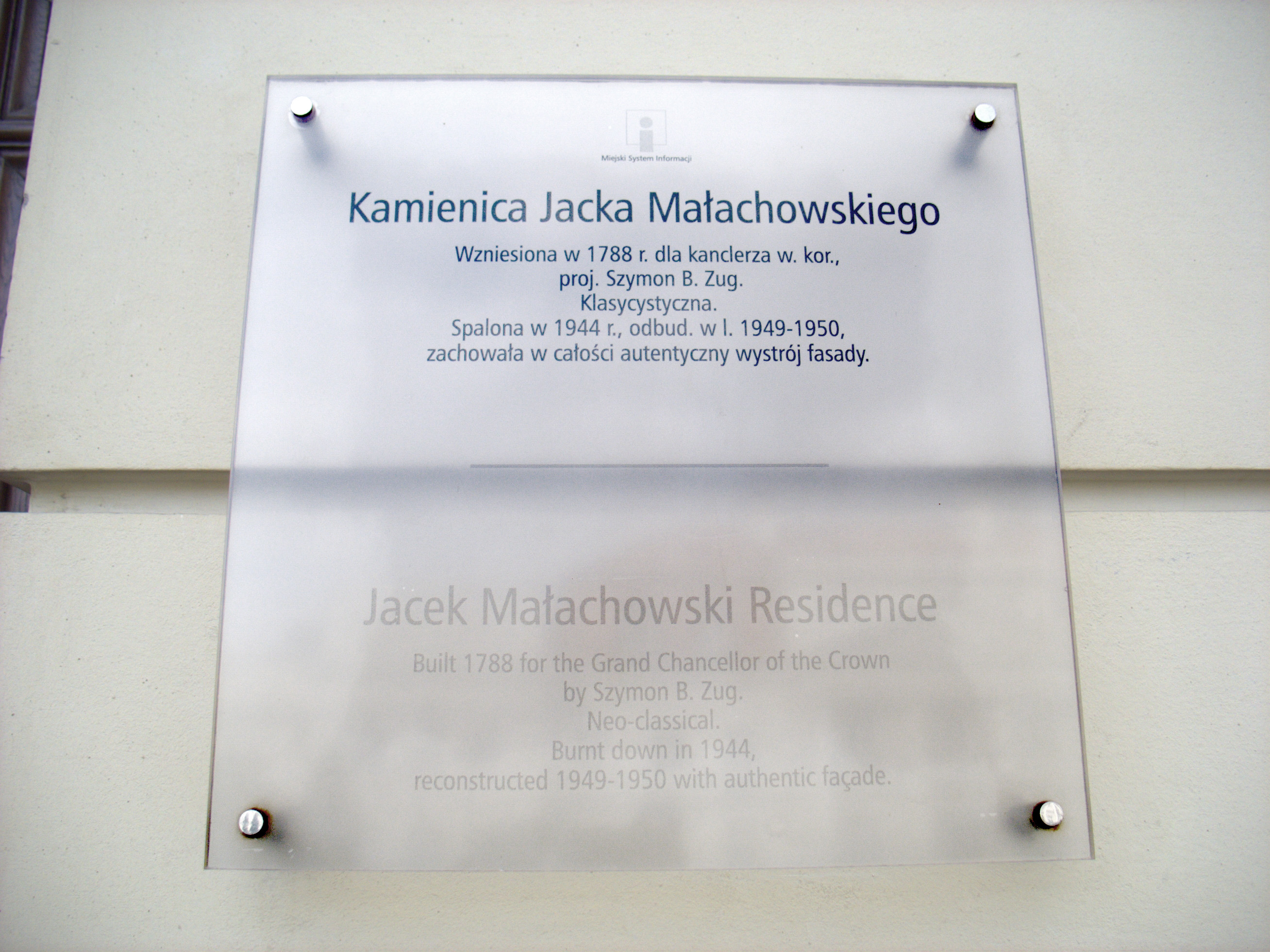 Kamienica Jacka Małachowskiego w Warszawie - tablica informacyjna.